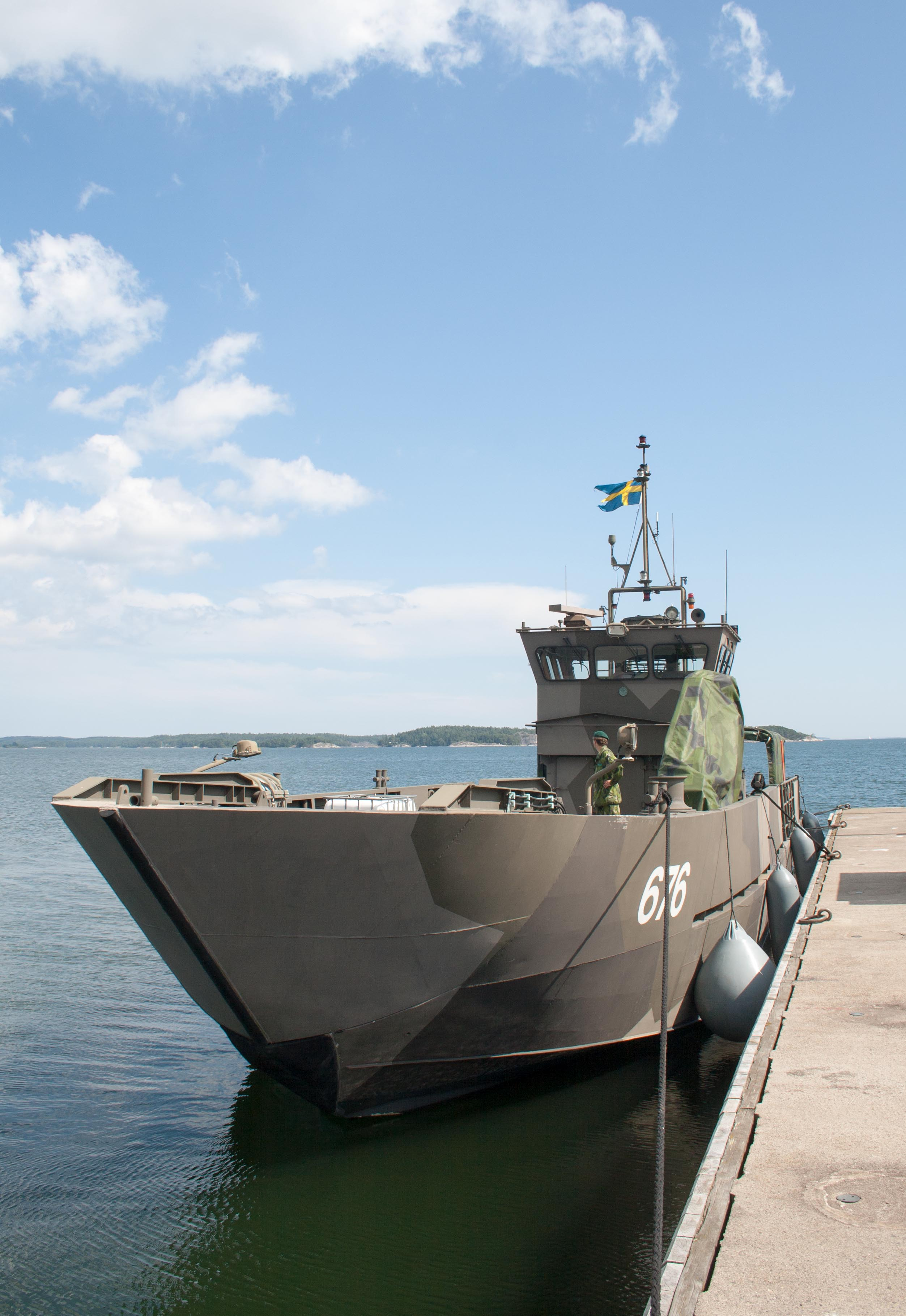 Ship at Berga navy base